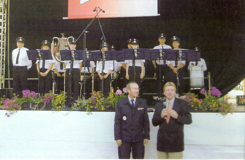 Hessentag 2005 in Weilburg am Platz der Feuerwehr - Innenminister Volker Bouffier mit Franz-Josef Sehr